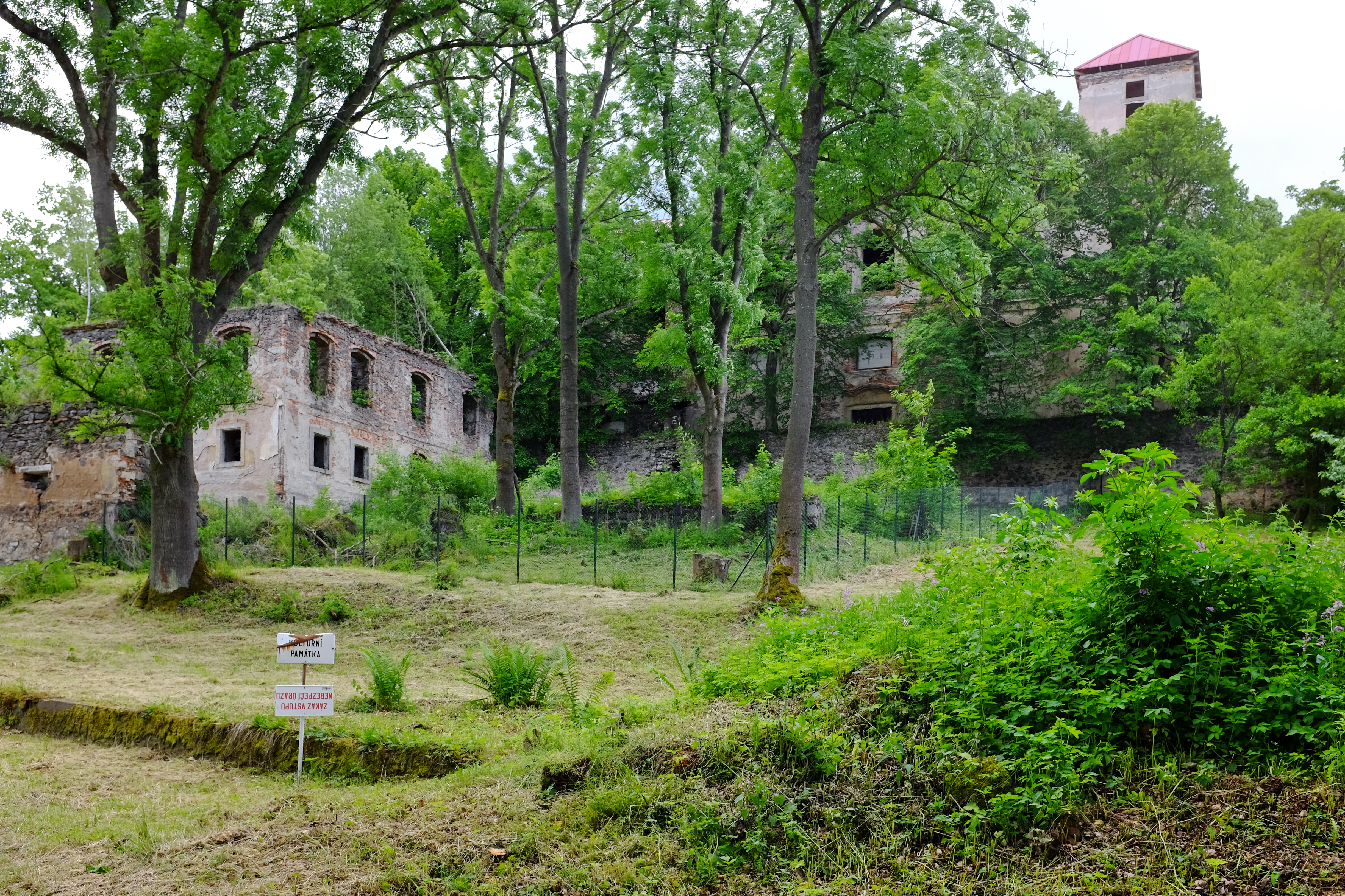 Svatobor, část obce Doupovské Hradiště, kostel Nanebevzetí Panny Marie, okres Karlovy Vary